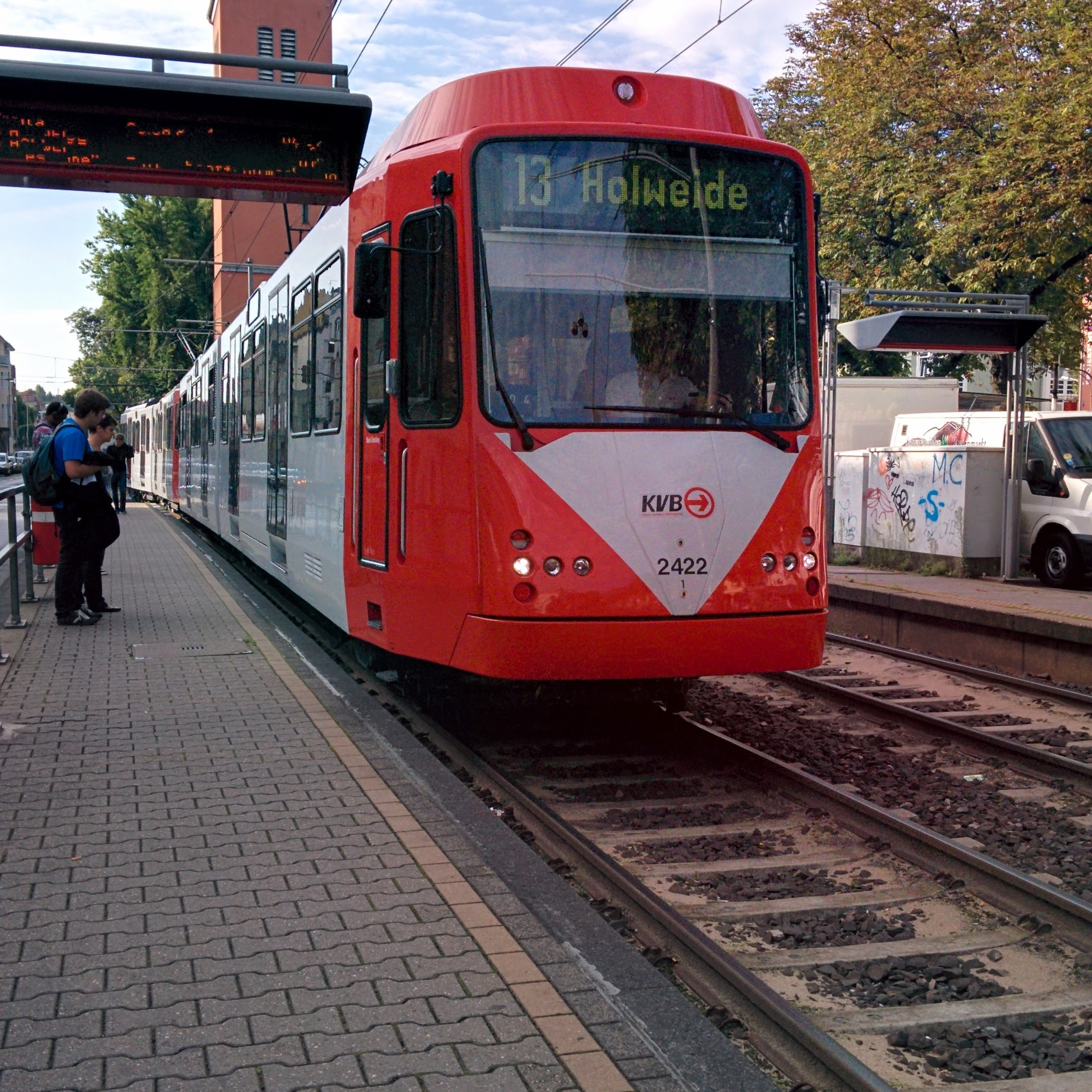 Aufgearbeiteter Stadtbahnzug der KVB 2014, Fahrzeug 2422